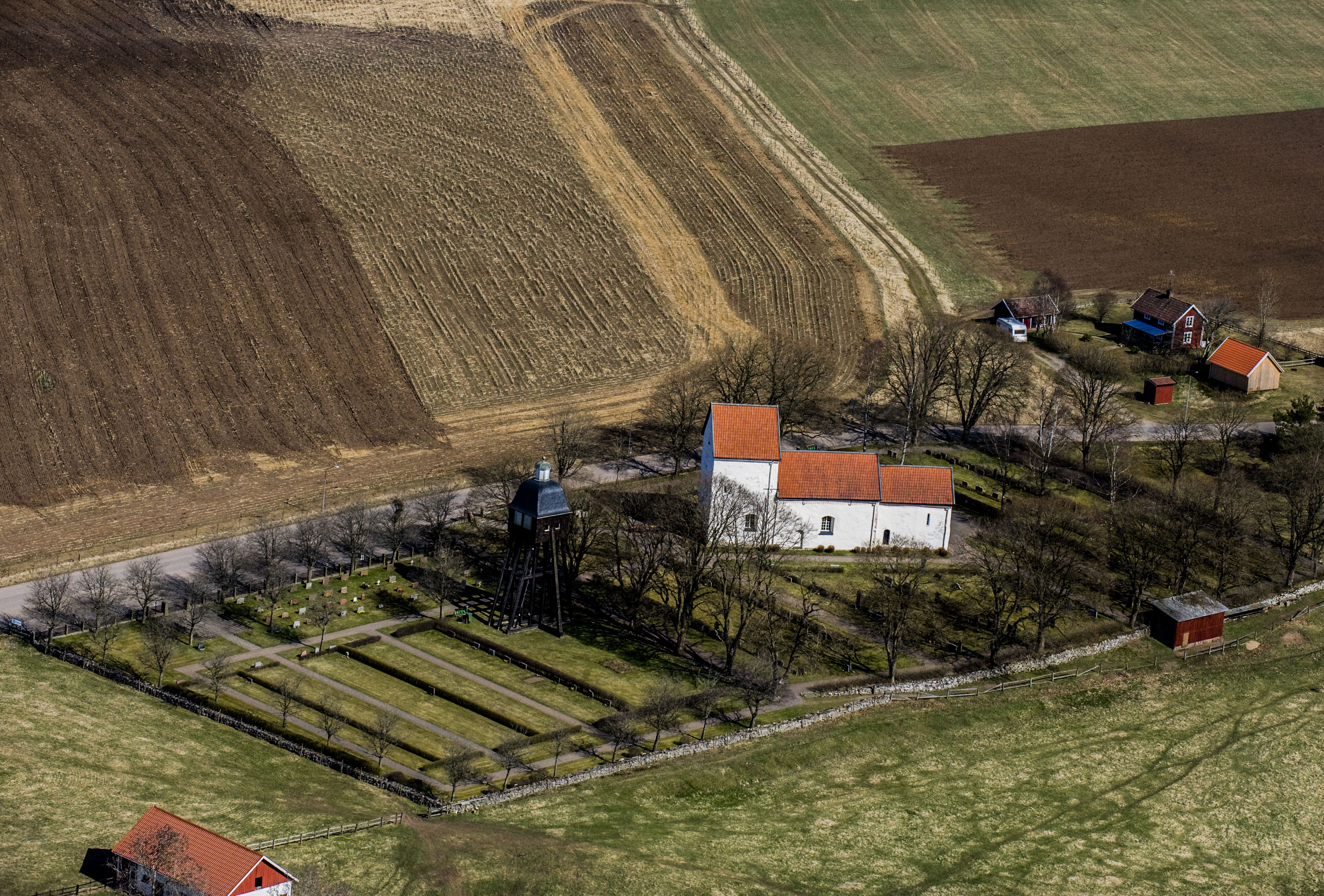 Norra Ljunga kyrka